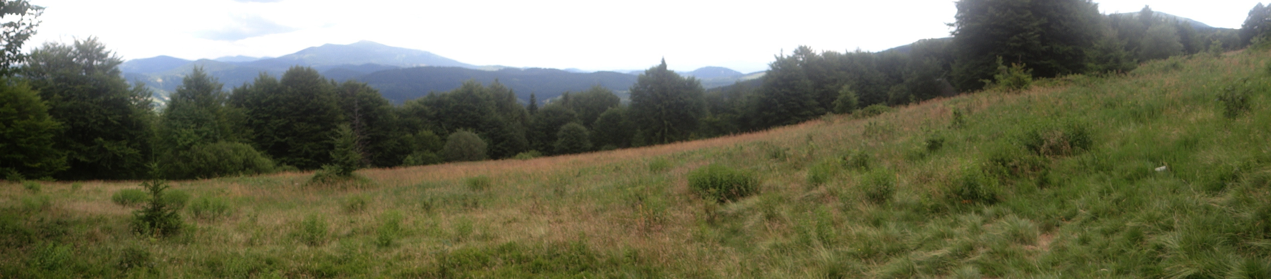 Hala Uszczawne i panorama widokowa